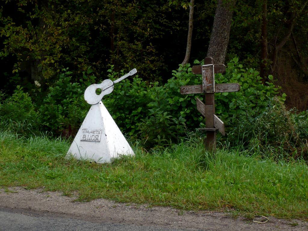 Teitupītes tilts, V. Coja piemiņas zīme 2008-09-05